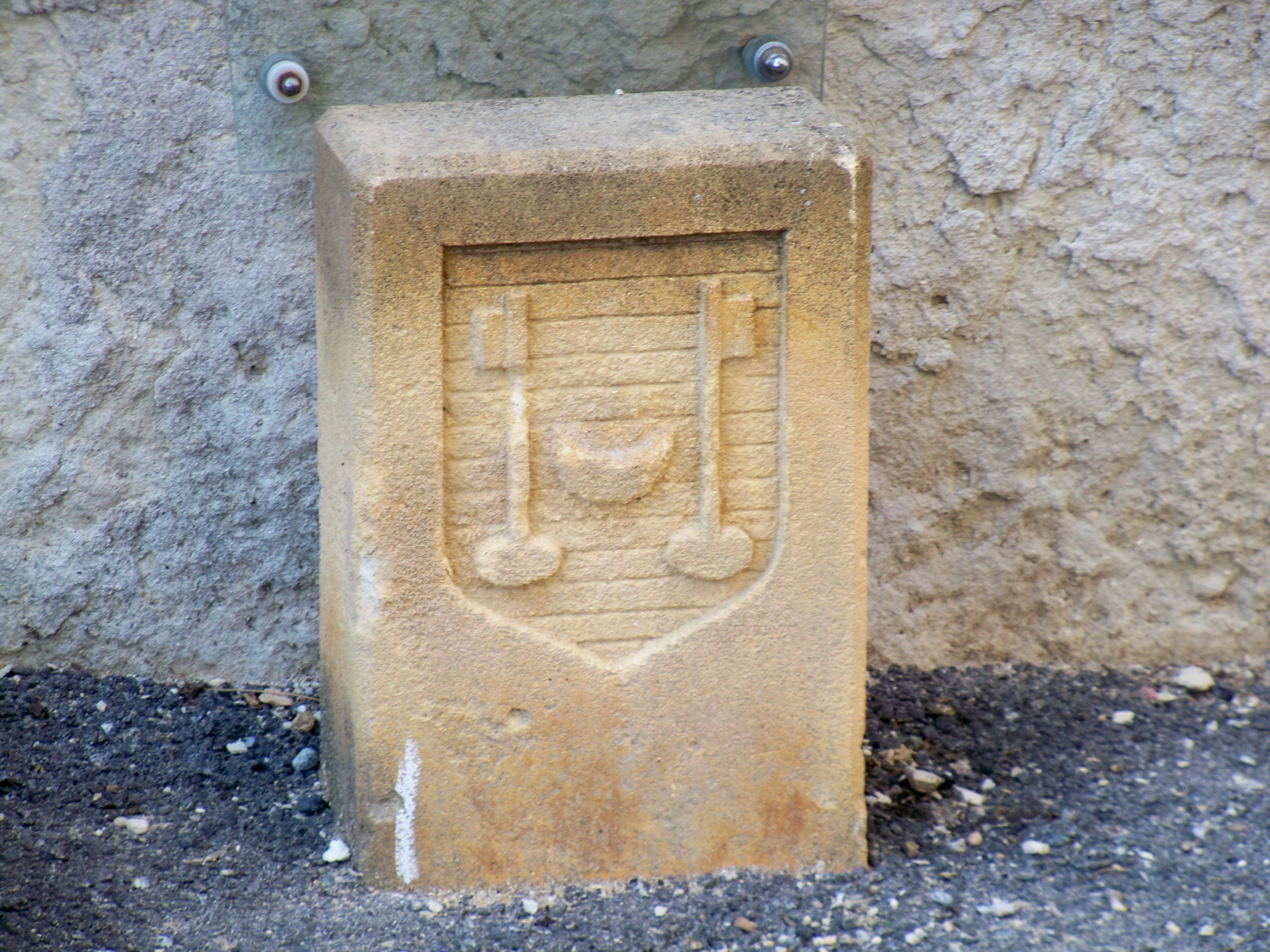 Blason de Valréas